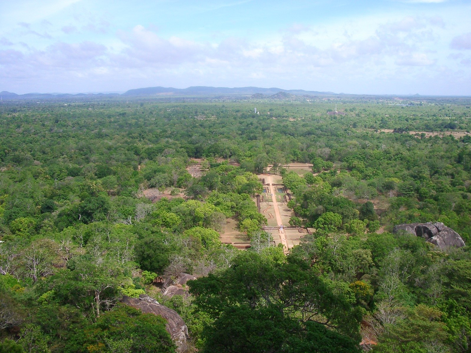 Jardins de Sigiriya vistos des la roca, foto feta per J, Ollé el juliol del 2006